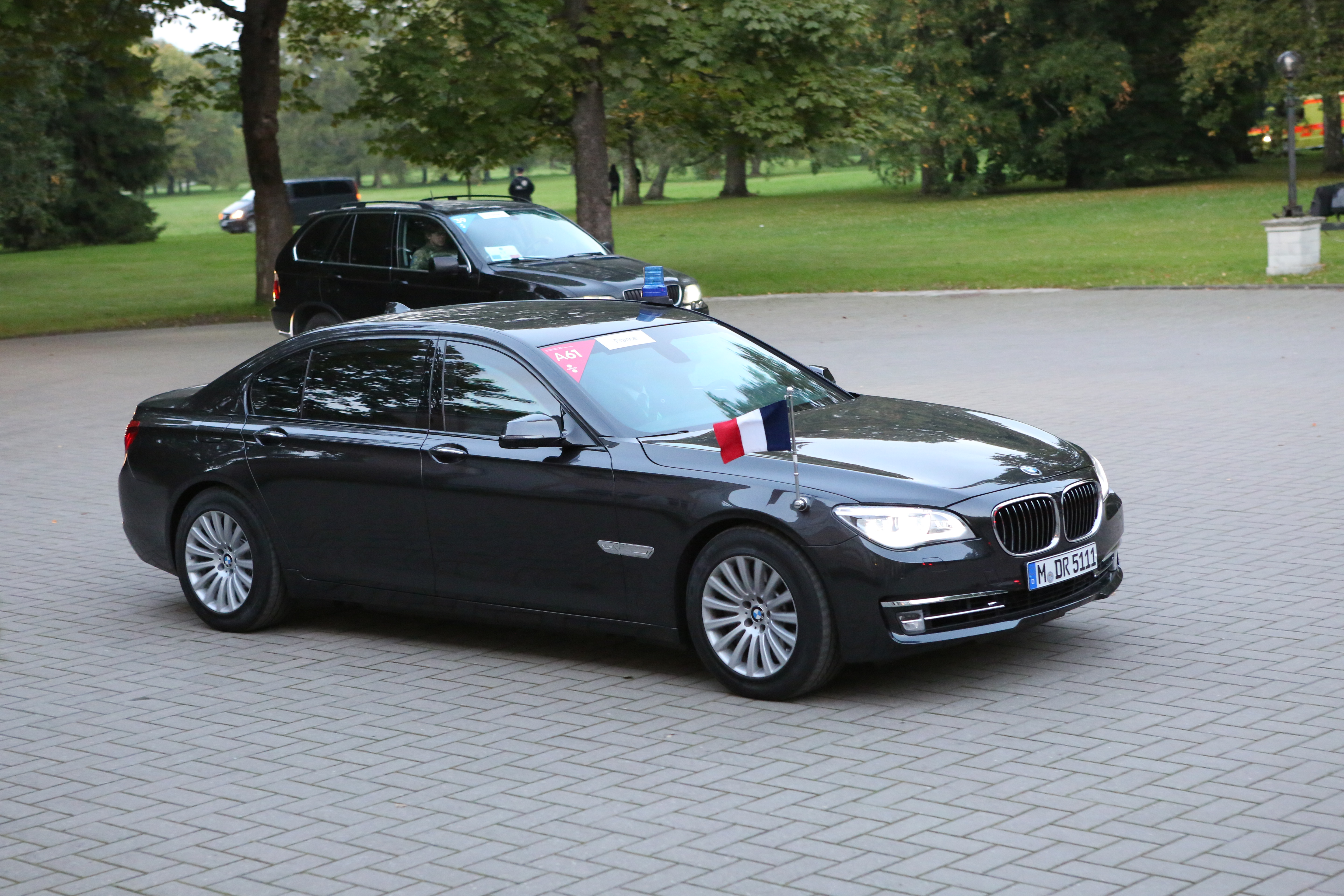 Photo: Annika Haas (EU2017EE)